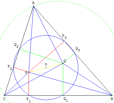 Conjugué isogonal